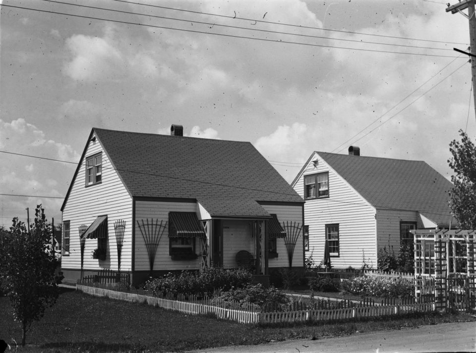 Maison située rue de Londres à Saint-Laurent. Elle est rehaussée en façade d'un jardin de fleurs.